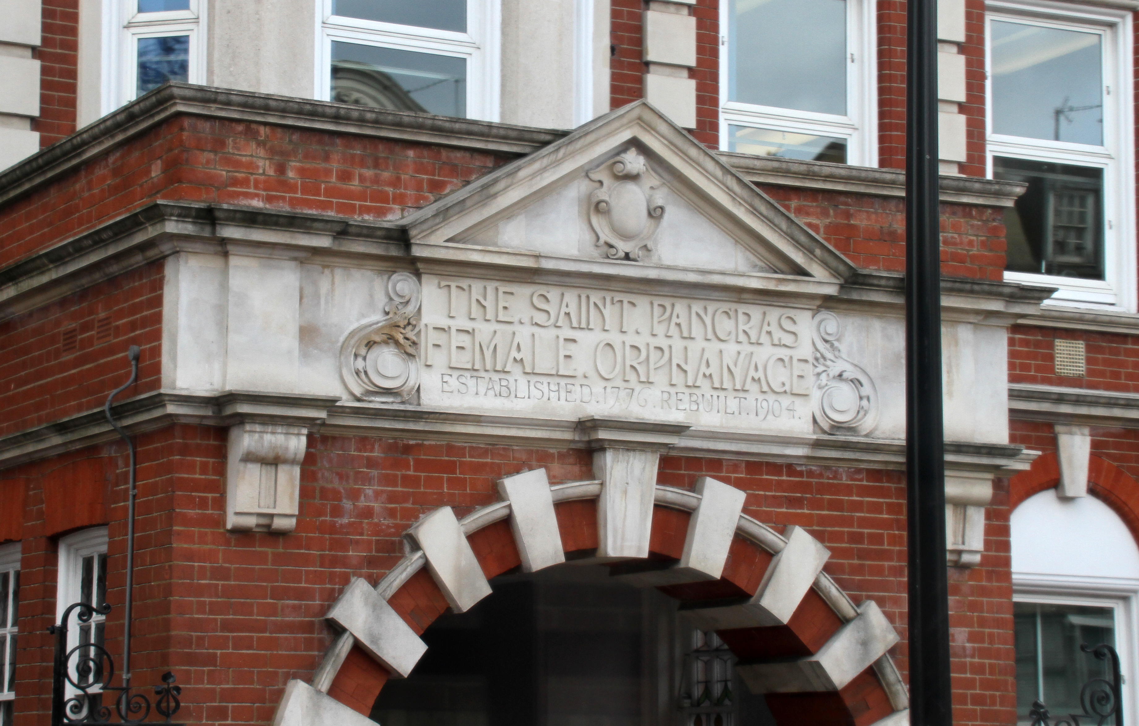 Saint Pancras Female Orphanage